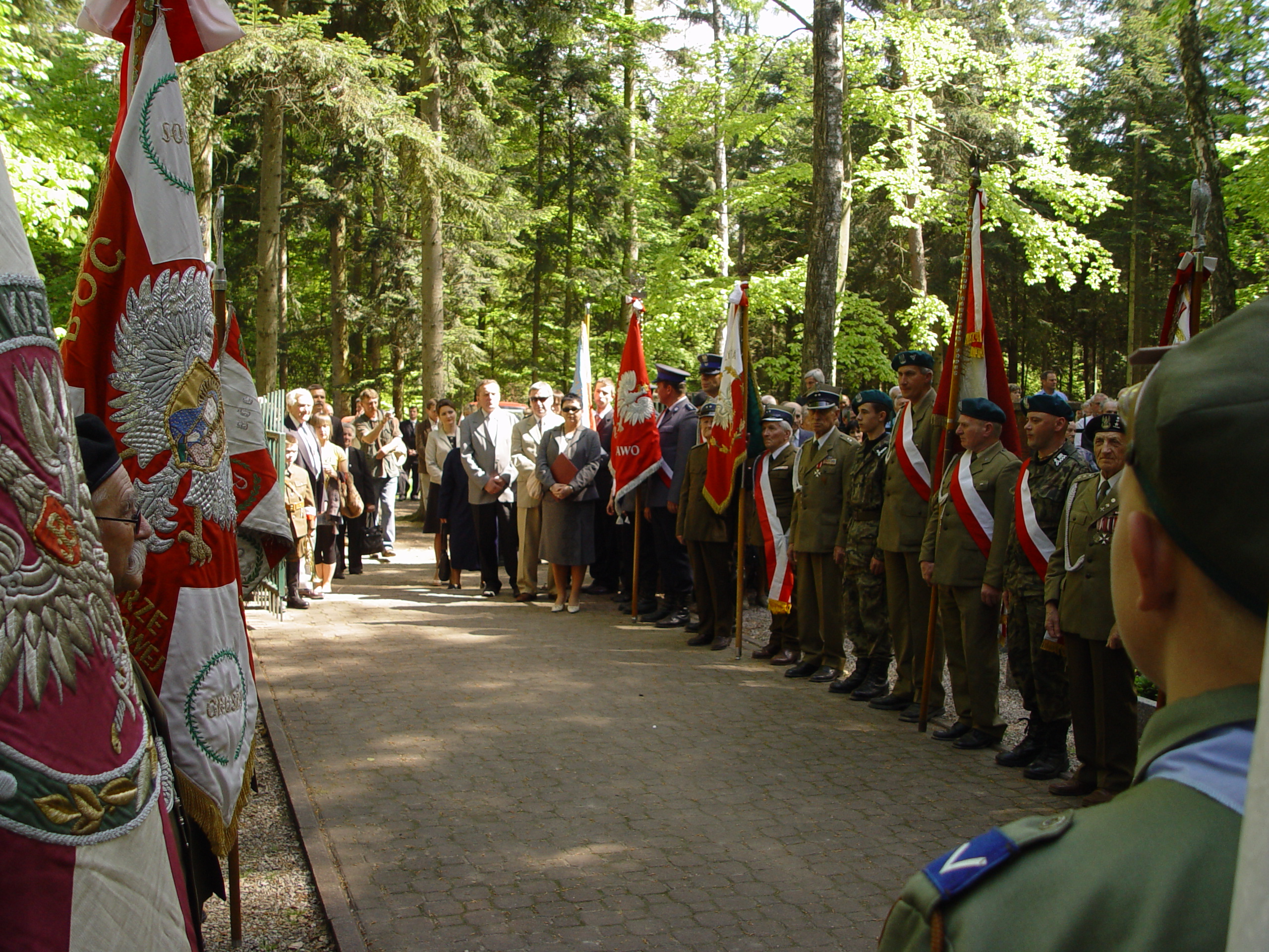 Polowa Msza Św. na cmentarzu wojennym AK Podobwodu "Morwa" w dniu 11 maja 2008 r. (lokalizacja